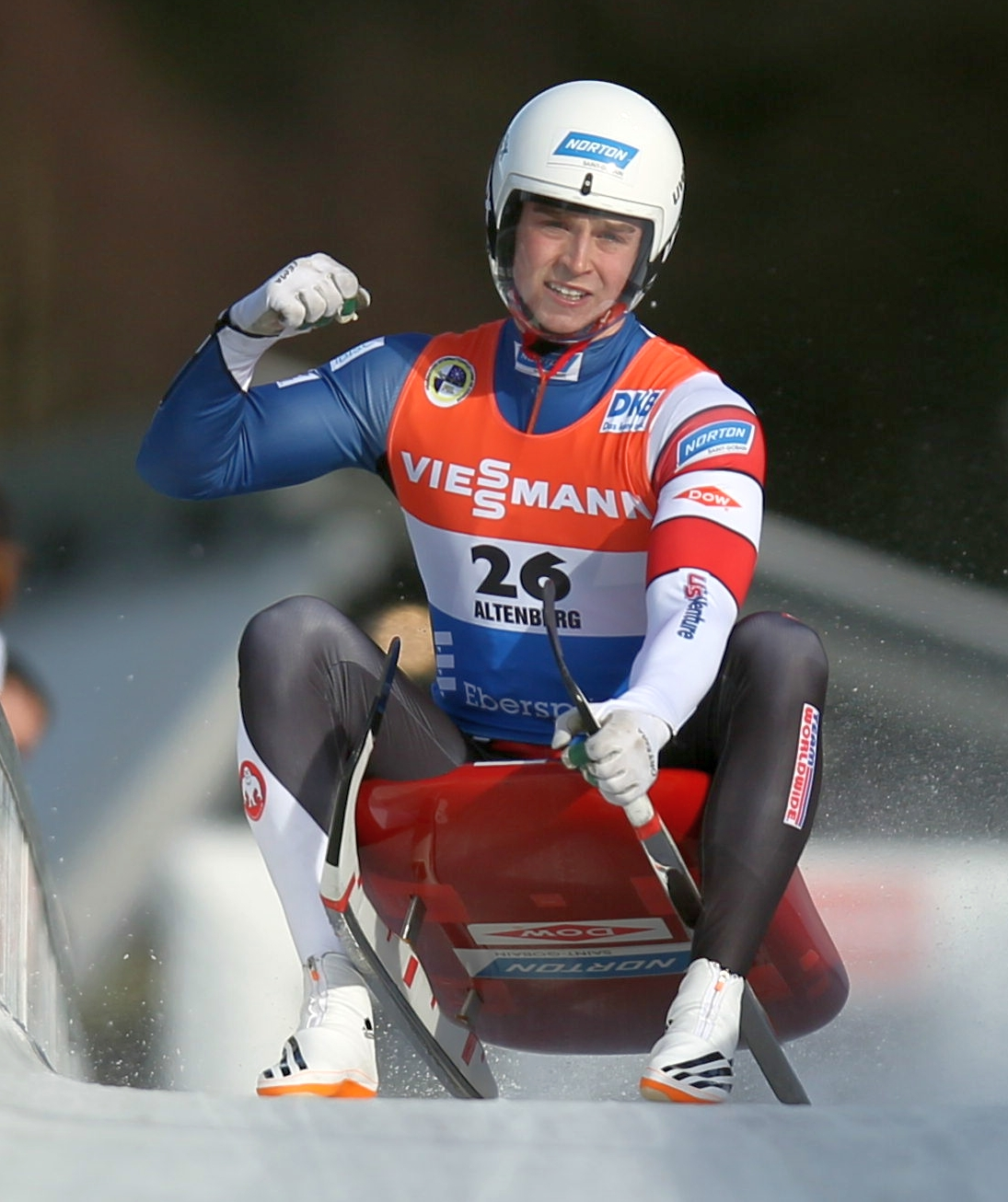 Tucker West beim Rennrodel-Weltcup der Herren in Altenberg 2017